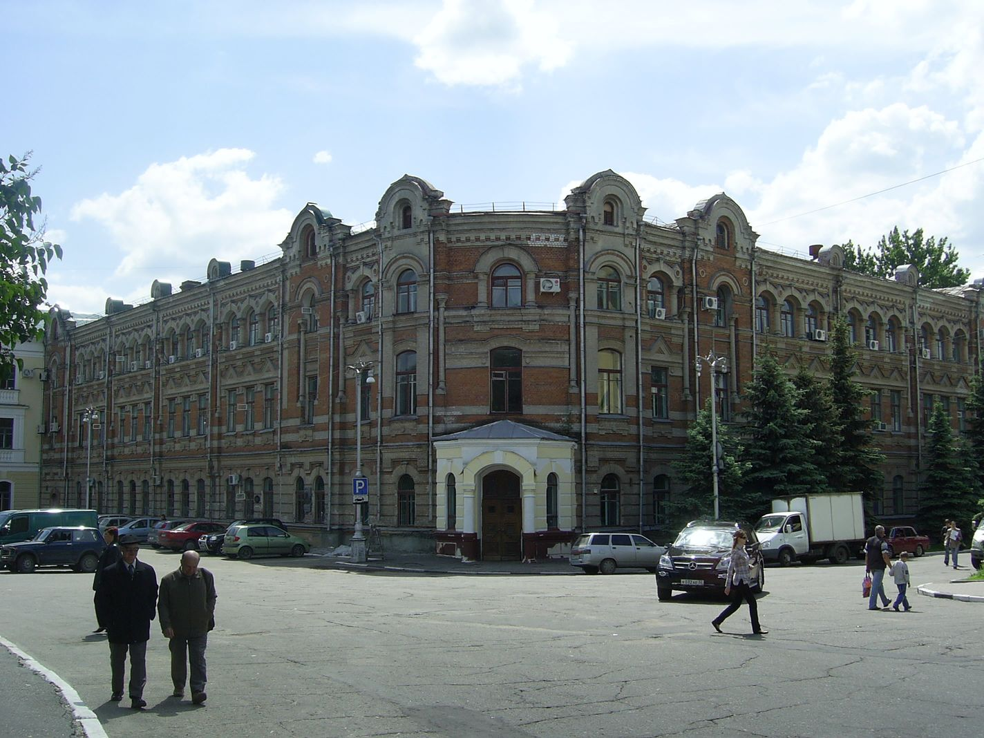 Брянск, площадь Карла Маркса (Красная пл.). Бывшая женская гимназия